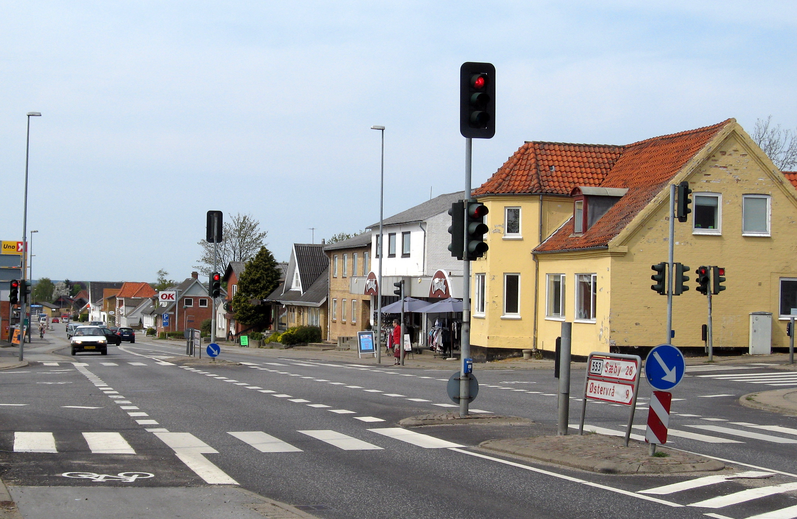 Tårs - en by i midten af Vendsyssel beliggende i Hjørring Kommune.